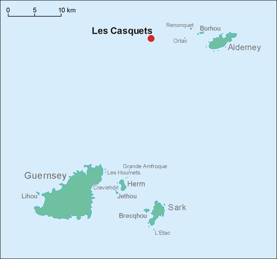 Location map of Les Casquets